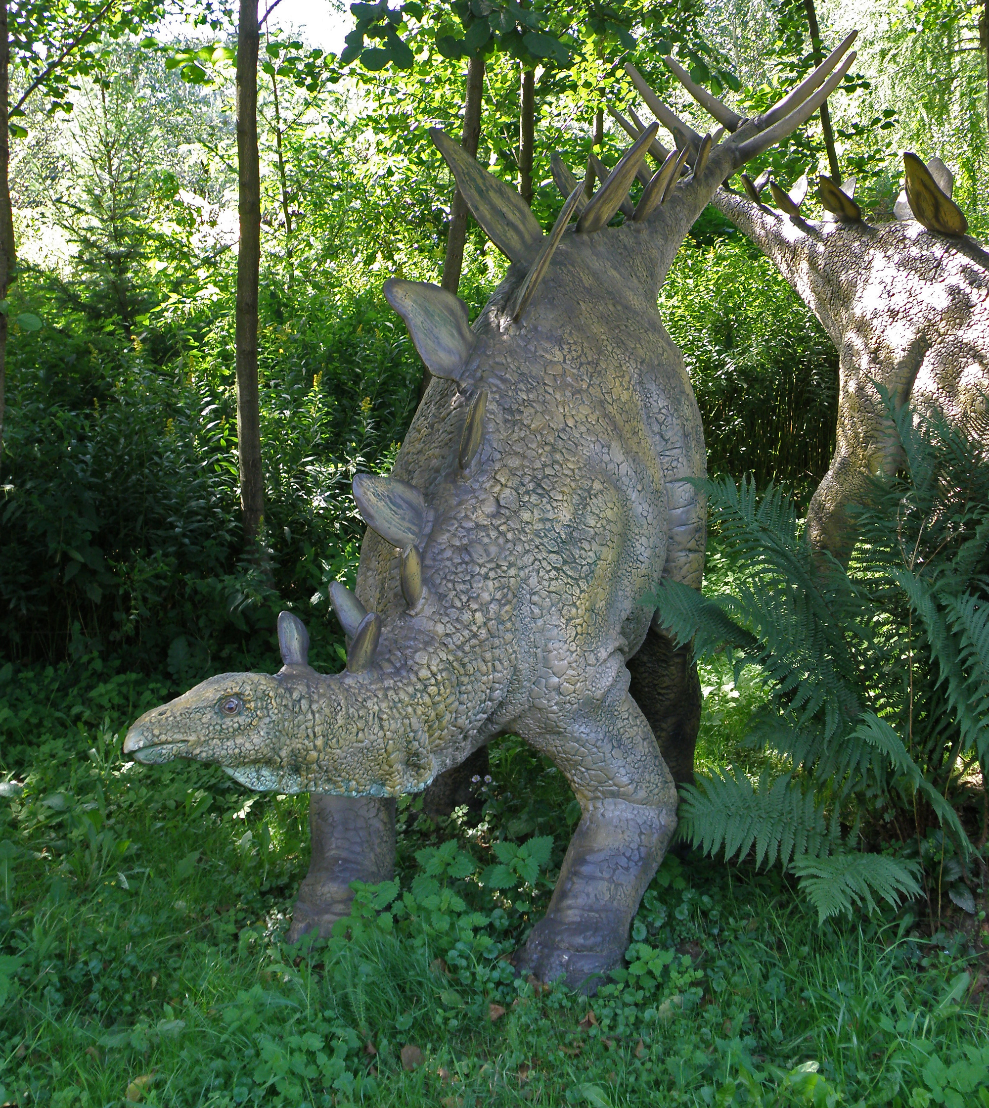 JuraPark Bałtów - Park Dinozaurów - Stegozaur